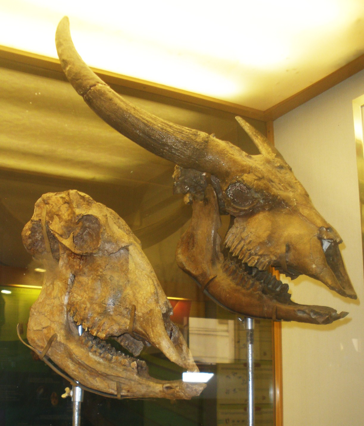 Fossil of Leptobos, an extinct mammal- Took the picture at Museo di Paleontologia di Firenze